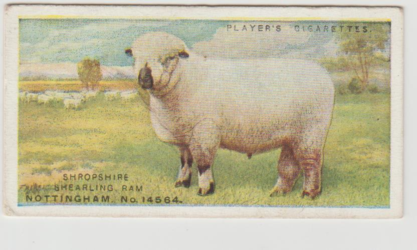 Player's cigarettes : Shropshire sheep.